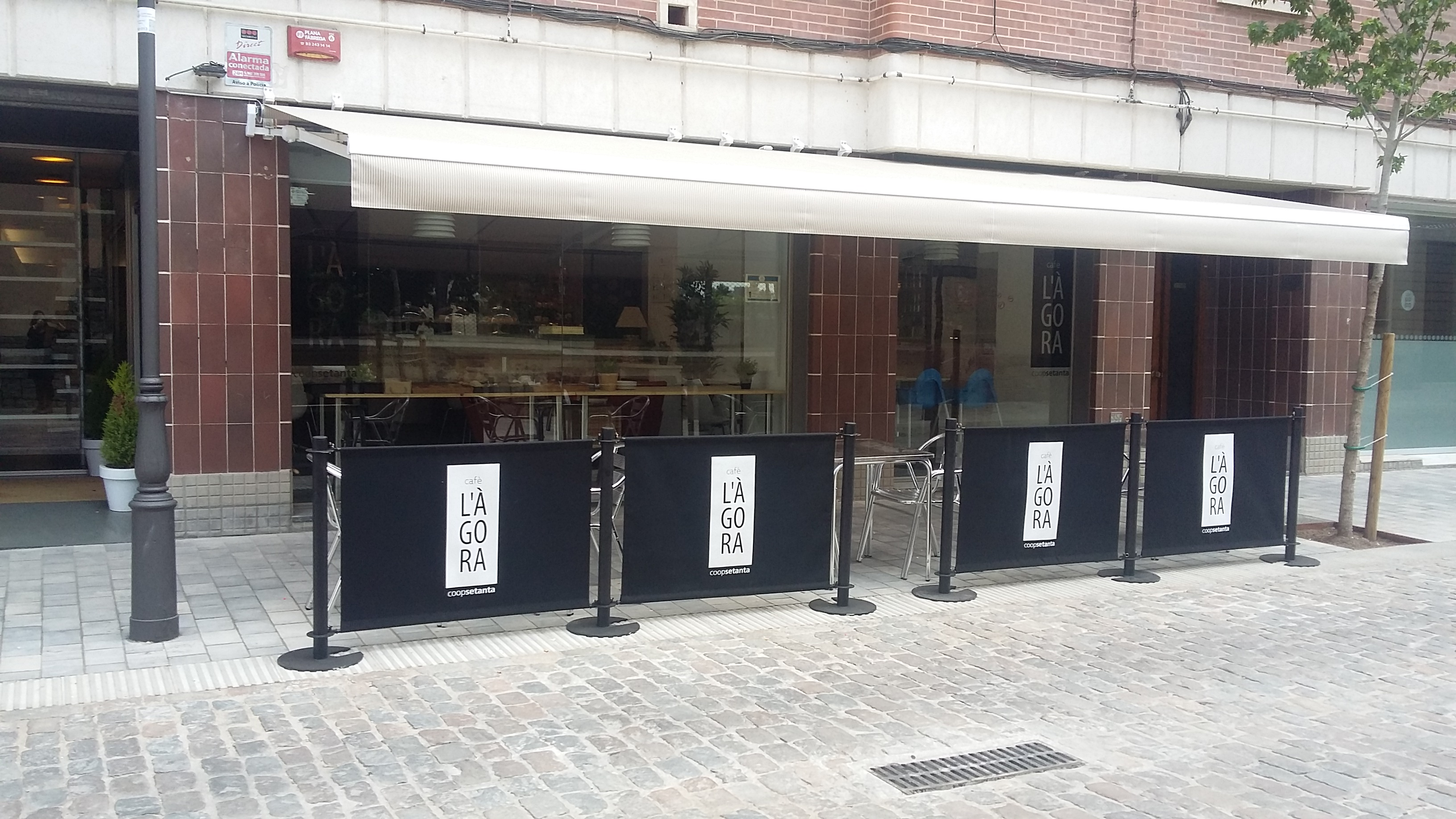 Seu social de la Cooperativa amb servei de cafeteria obert a socis i no socis.